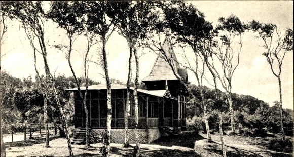 Verlobungshaus Kronprinzenpaar